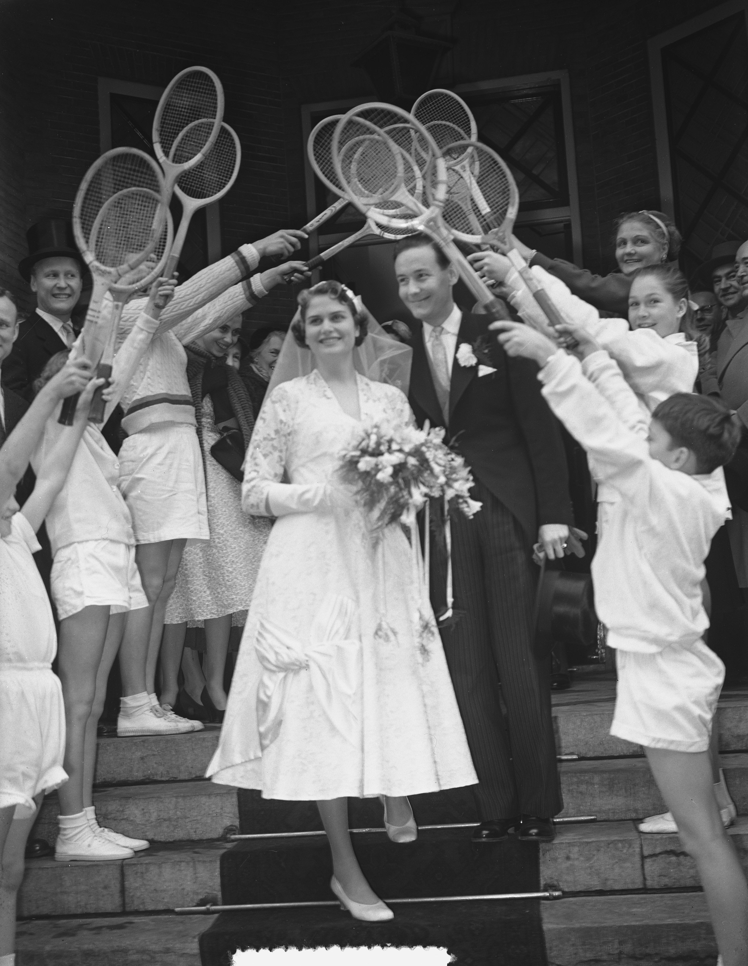 Collectie / Archief : Fotocollectie Anefo Reportage / Serie : [ onbekend ] Beschrijving : Huwelijk Fenny ten Broek (tennis) met mr. J. F. A. de Soet Datum : 3 maart 1956 Trefwoorden : HUWELIJKEN, TENNIS Persoonsnaam : Fenny Ten Broek, Soet, J.F.A. de Fotograaf : Bilsen, Joop van / Anefo Auteursrechthebbende : Nationaal Archief Materiaalsoort : Glasnegatief Nummer archiefinventaris : bekijk toegang 2.24.01.09 Bestanddeelnummer : 907-6205